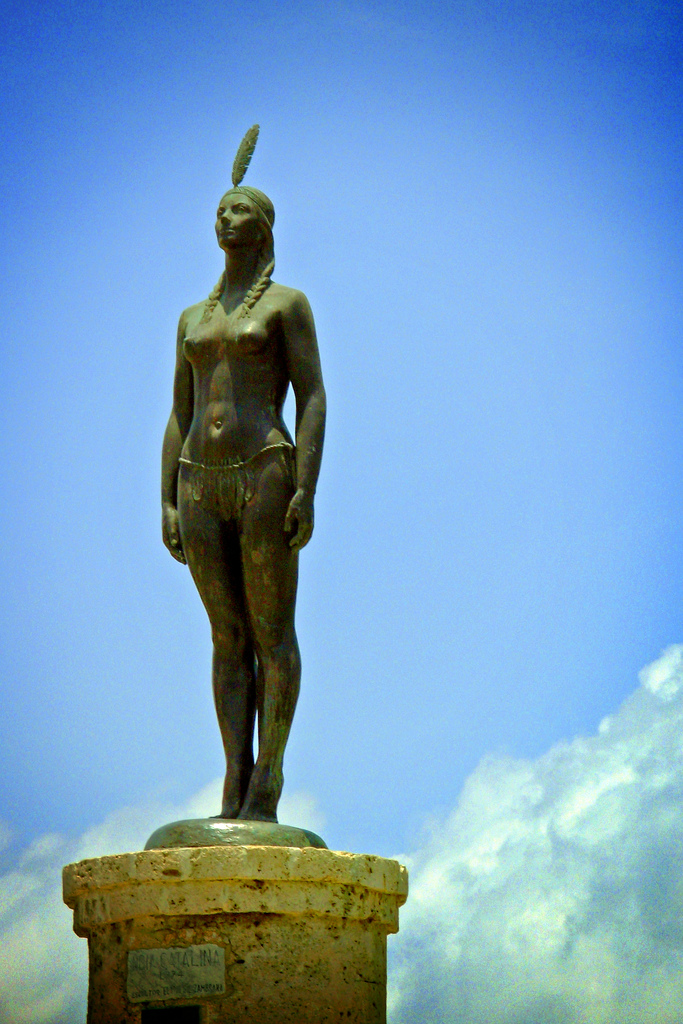 Monumento la India Catalina en Cartagena de Indias, ordenado por el Festival Internacional de Cine de Cartagena de Indias en 1974 Autor de la Escultura=Eladio Gil Zambrana Año de Creación de la Escultura=1974 Ubicación=Cartagena de Indias, Bolívar Colombia Dimensiones=Altura: 2,95 m